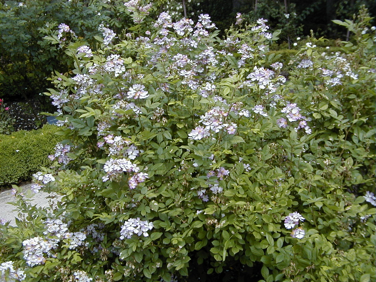 Rosa multiflora, sect. Synstylae. Real Jardín Botánico de Madrid